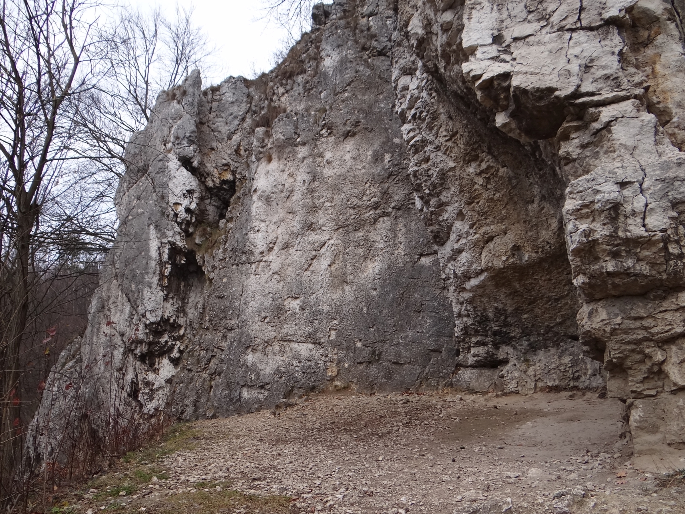 Skały Lotniki w Dolinie Kobylańskiej